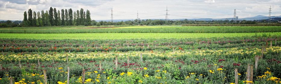 Gartenland Grünes C